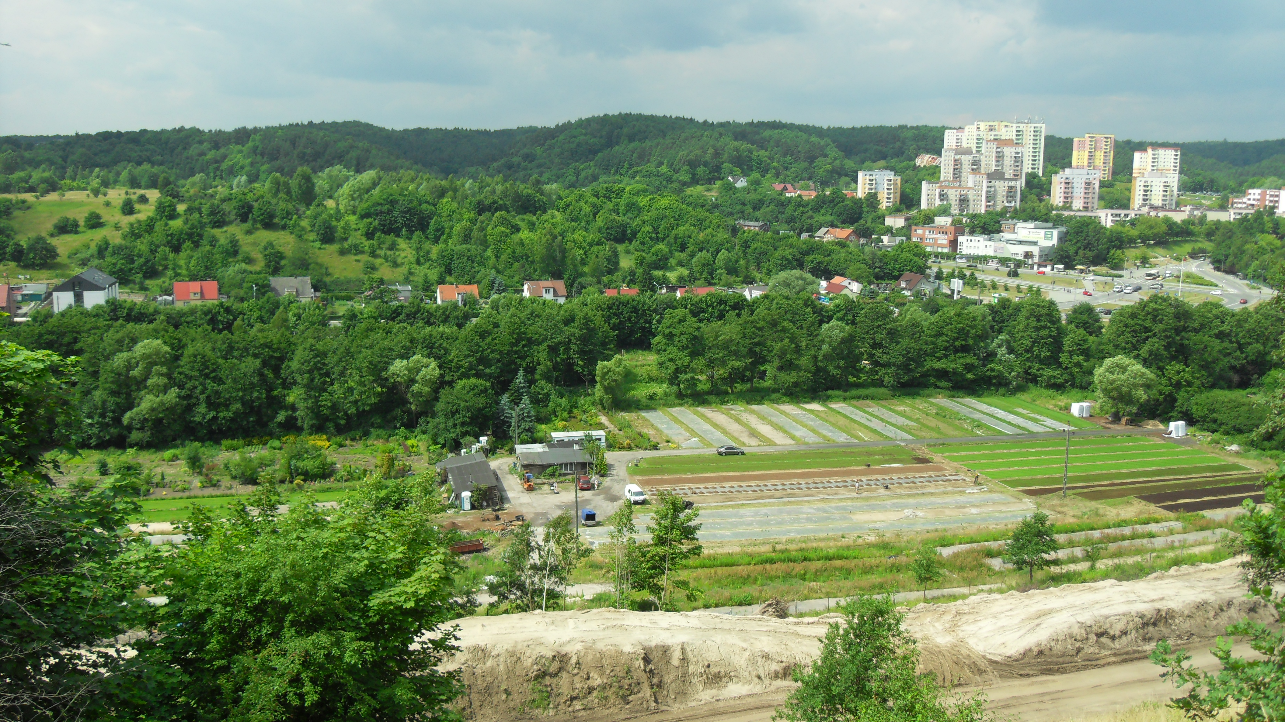 Gdańsk Brętowo, bloki Niedźwiednika.